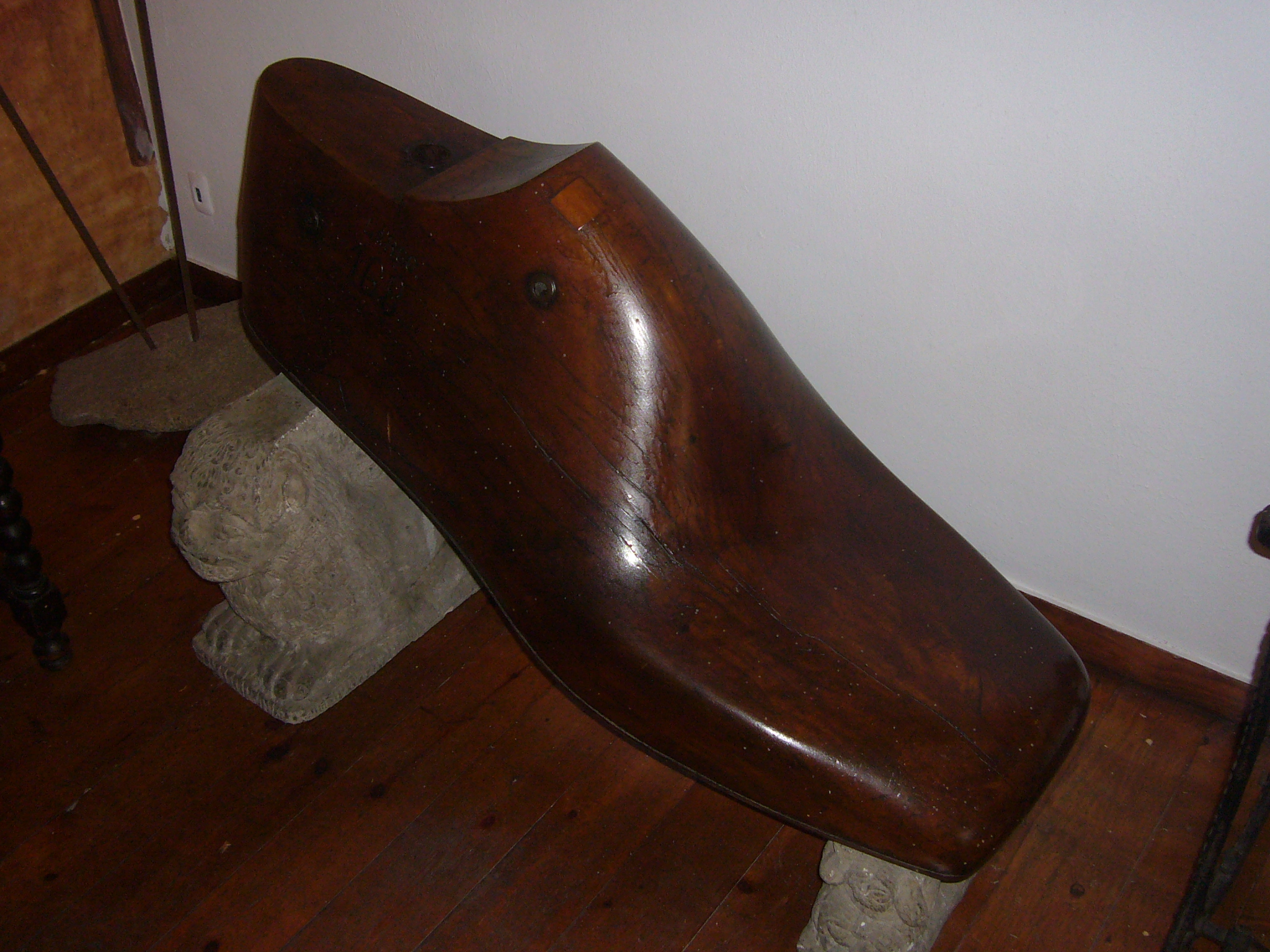 Sabata de fusta del monument a Colom, de Barcelona. Pes de 92 kg. Museu del Calçat.